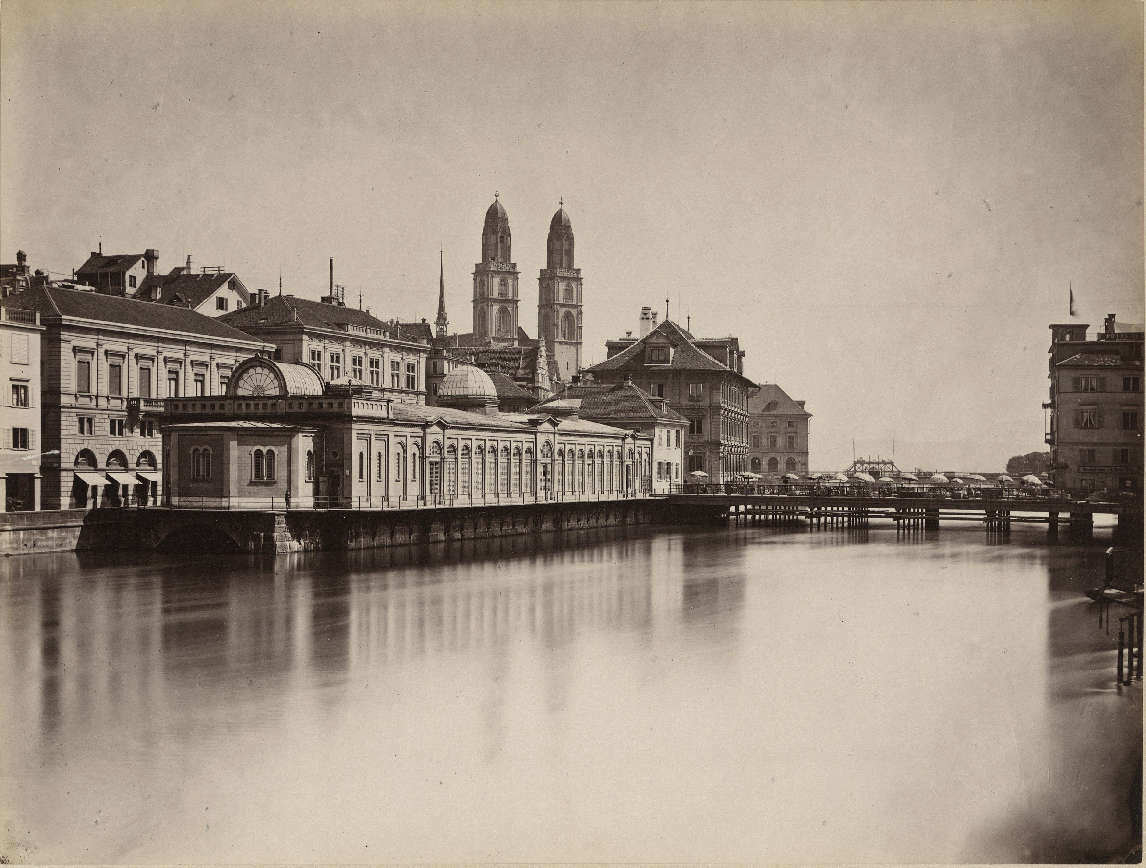 Zürich, Fleischhalle